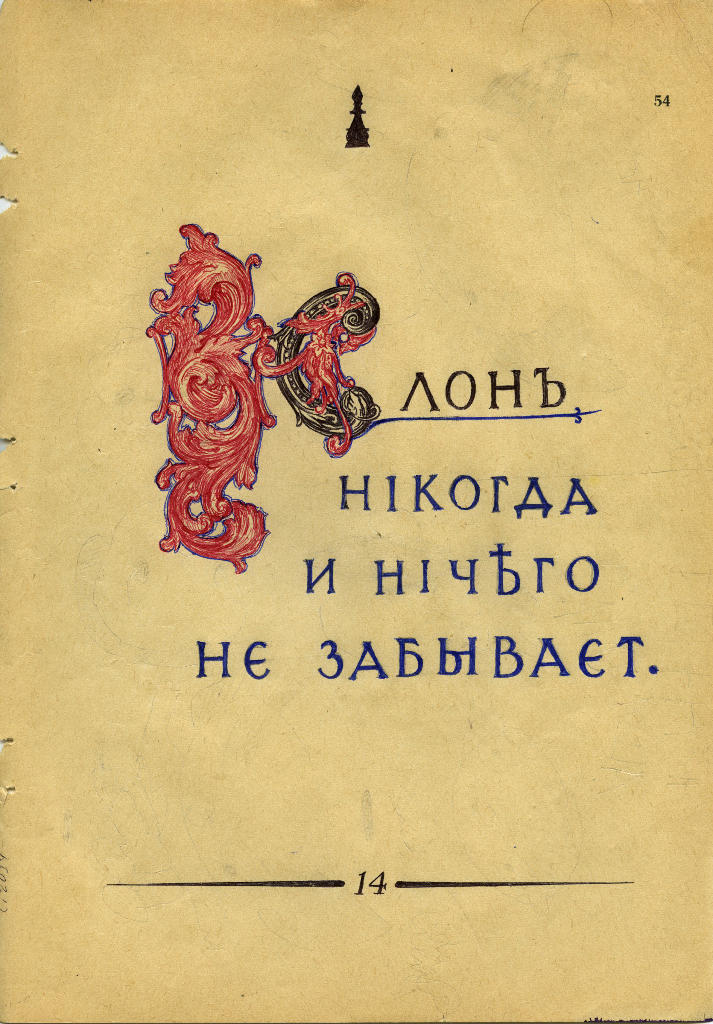 Робота Андрія Стегури, "А4, Кулькова ручка", 2014 рік